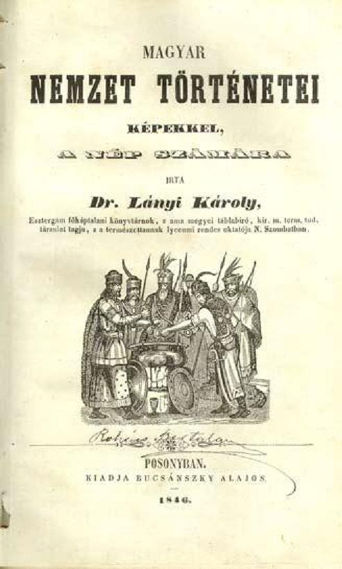 Magyar nemzet történetei képekkel, a nép számára című naptár